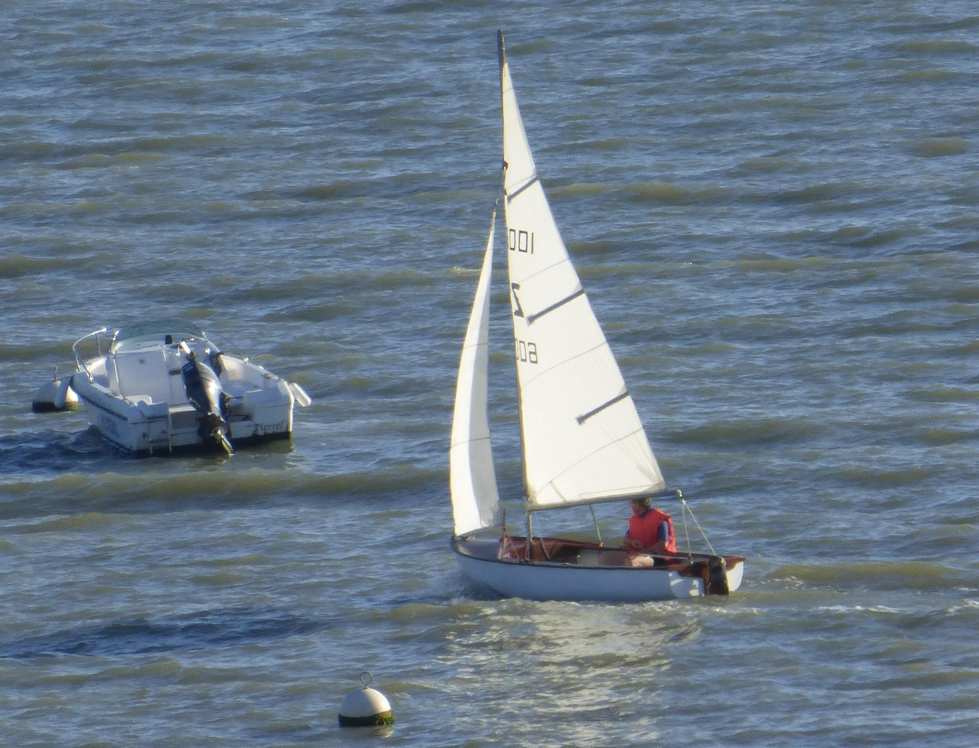 Zef sur l'estuaire de la Charente près de Fouras